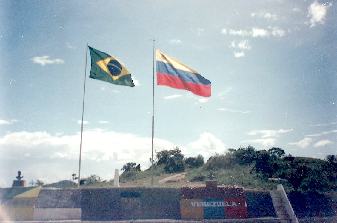 Monumento Fronterizo en la frontera de Brasil y Venezuela